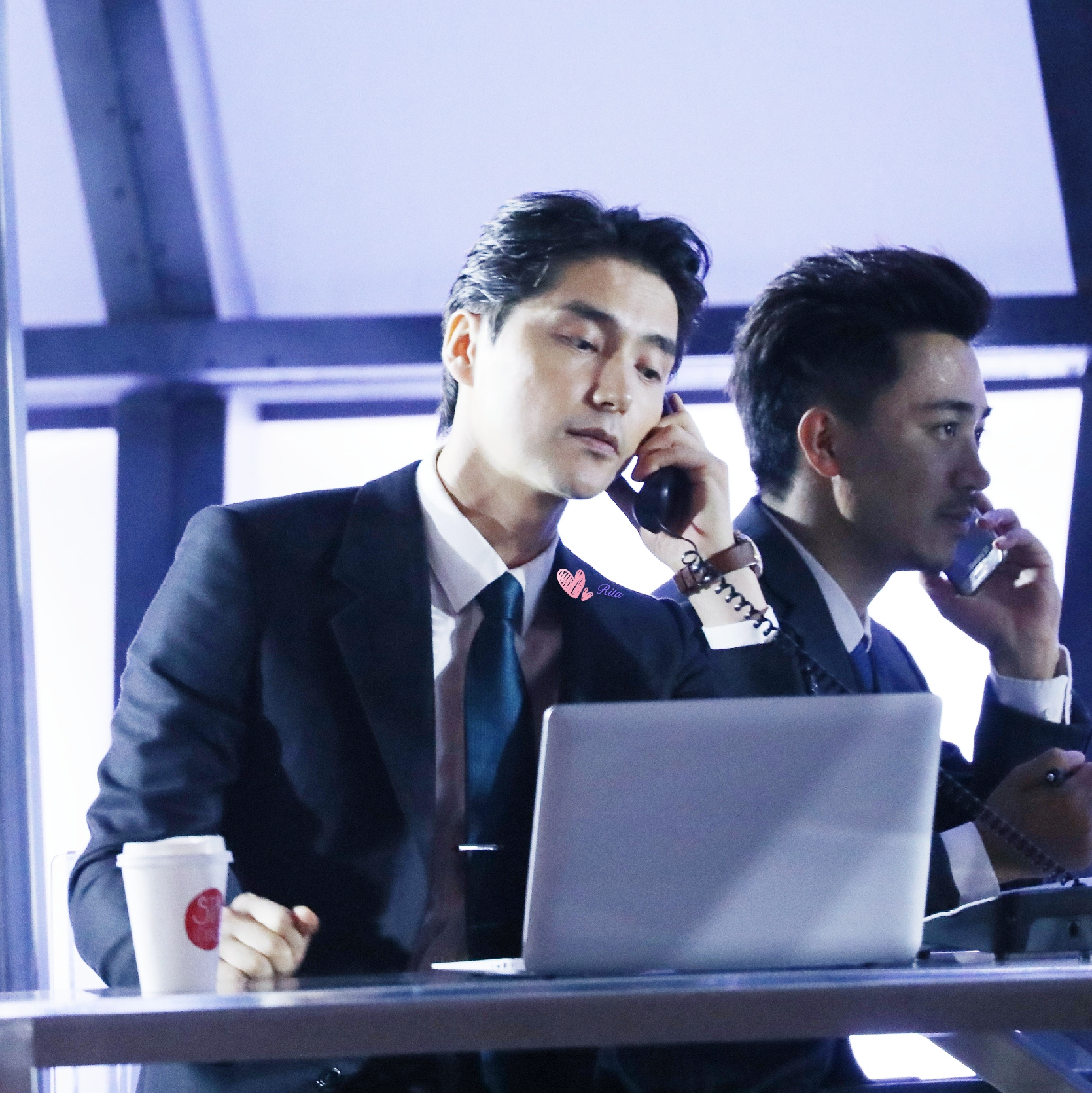 中文（中国大陆）: 20191007 话剧《威尼斯商人》晚场 阿云嘎